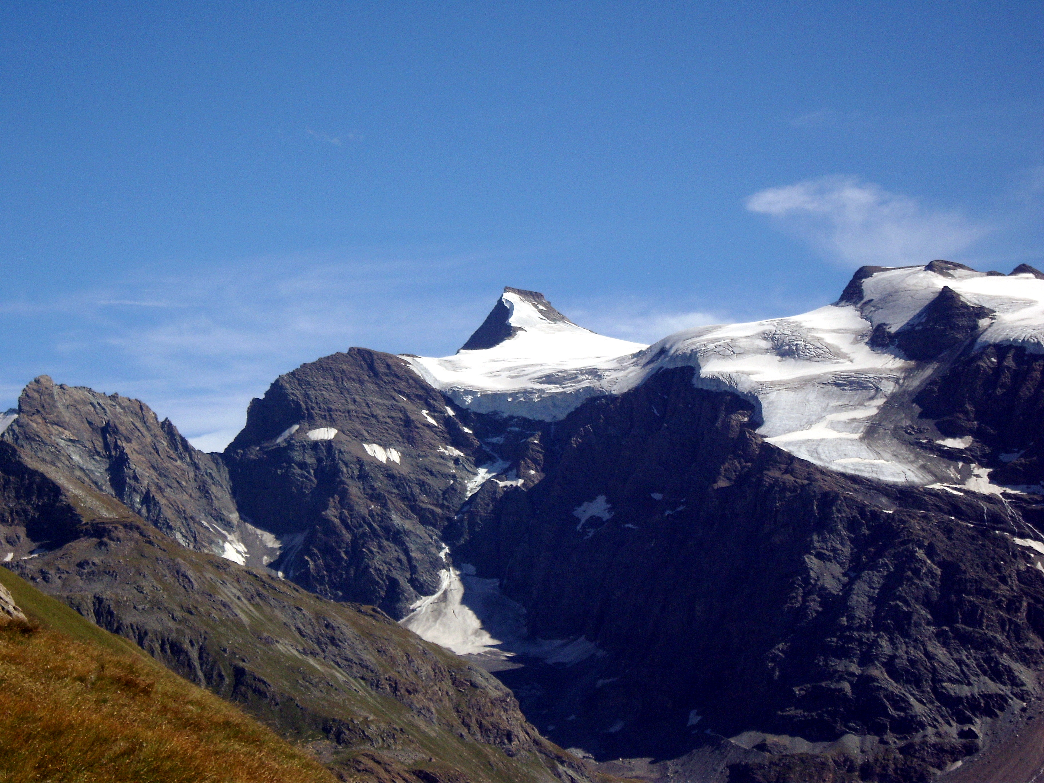 Vue de l'ouest du sommet de l'Albaron, depuis la route partant de Bonneval-sur-Arc et menant au col de l'Iseran